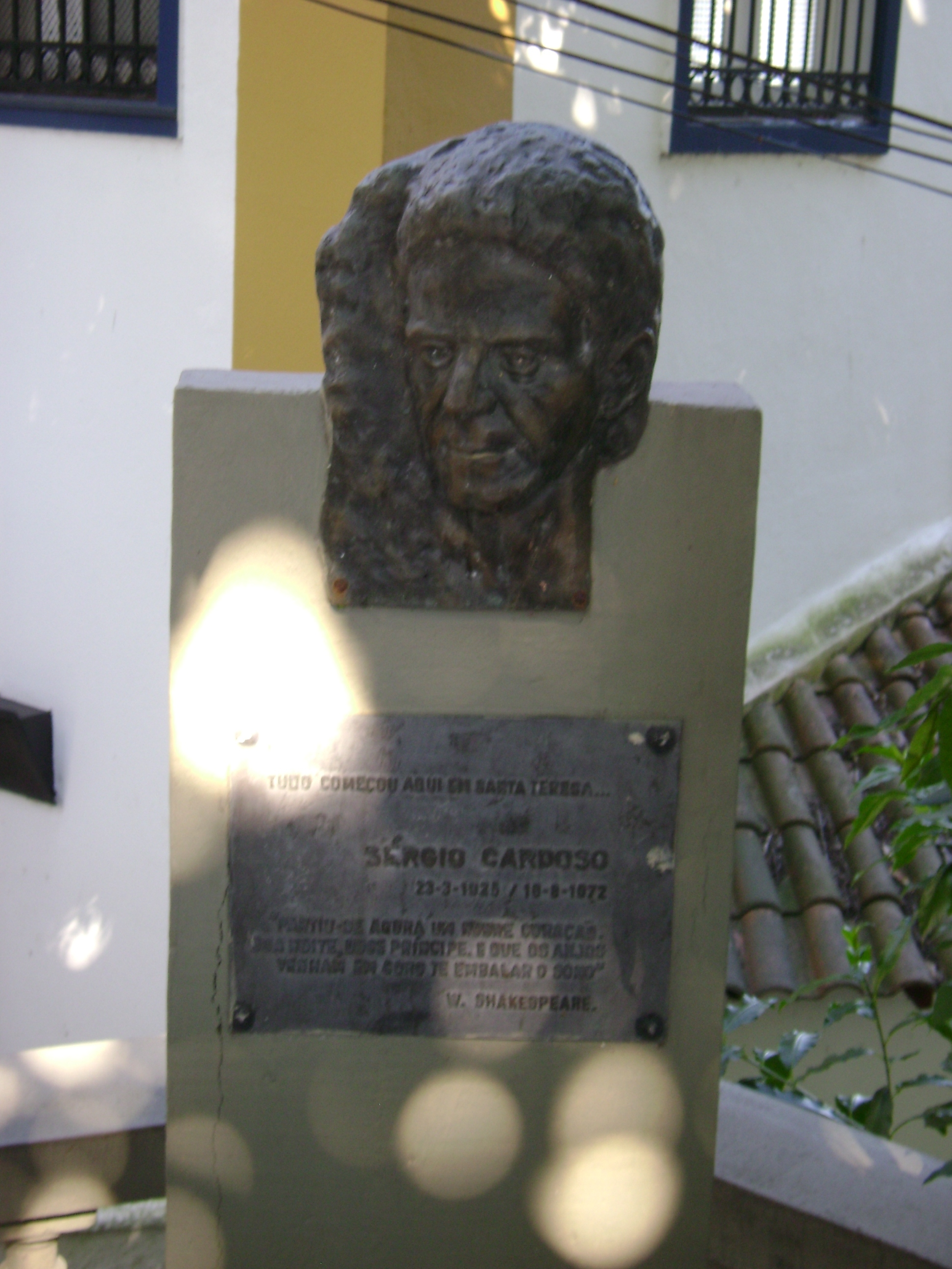 Estátua de Sérgio Cardoso no bairro de Santa Teresa, na cidade do Rio de Janeiro, Brasil.